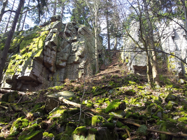 Skalní stěna